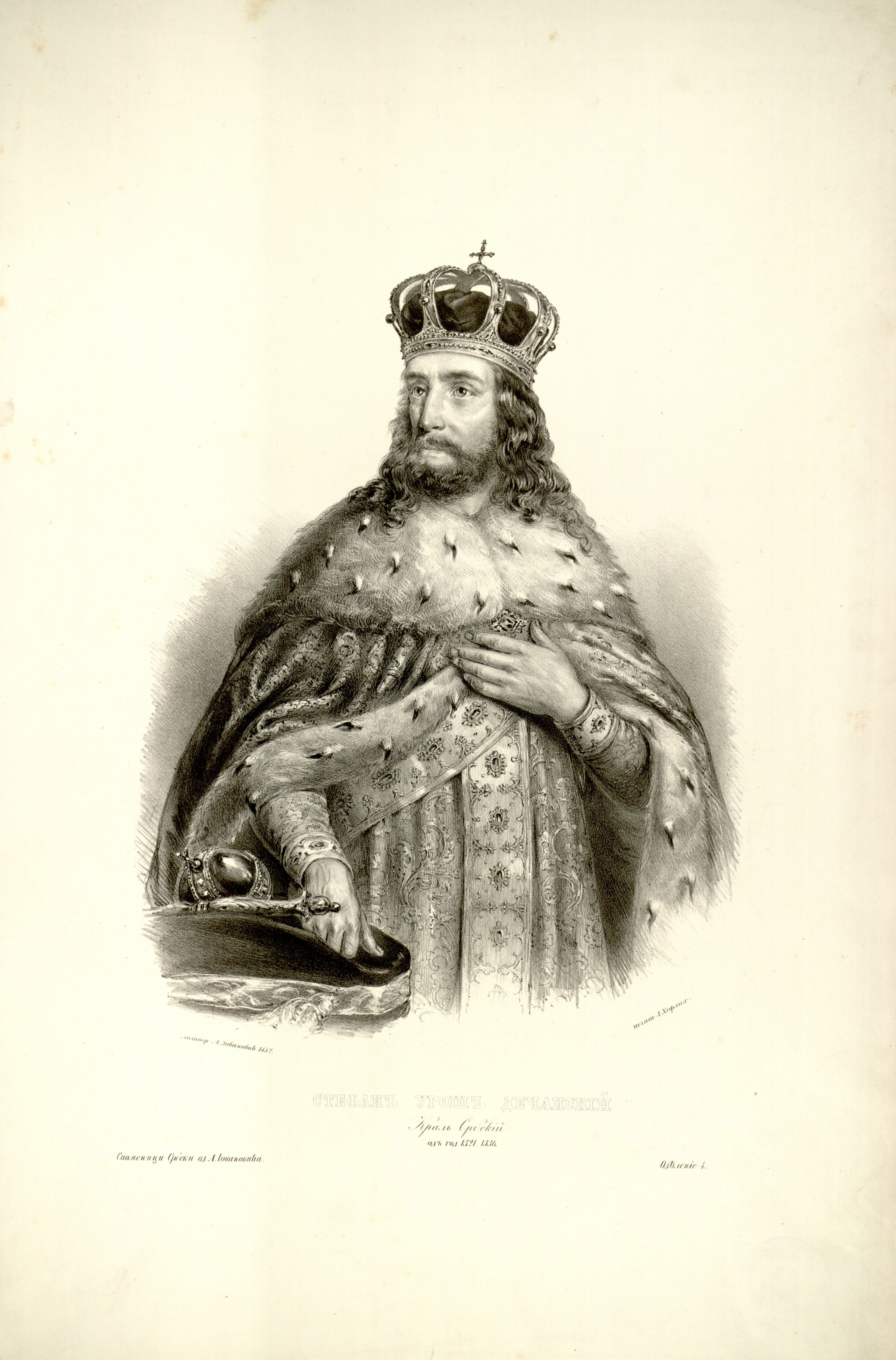 Lithograph of king Stefan Uroš by Anastas Jovanović. Caption: литогр. А. Іовановић 1852печат Ј. Хефлих. СТЕФАНЪ УРОШЬ ДЕЧАНСКІЙ Краль Србскій одъ год 1321-1336. Споменици Србски од А. Іовановића.Одѣленіе 4.